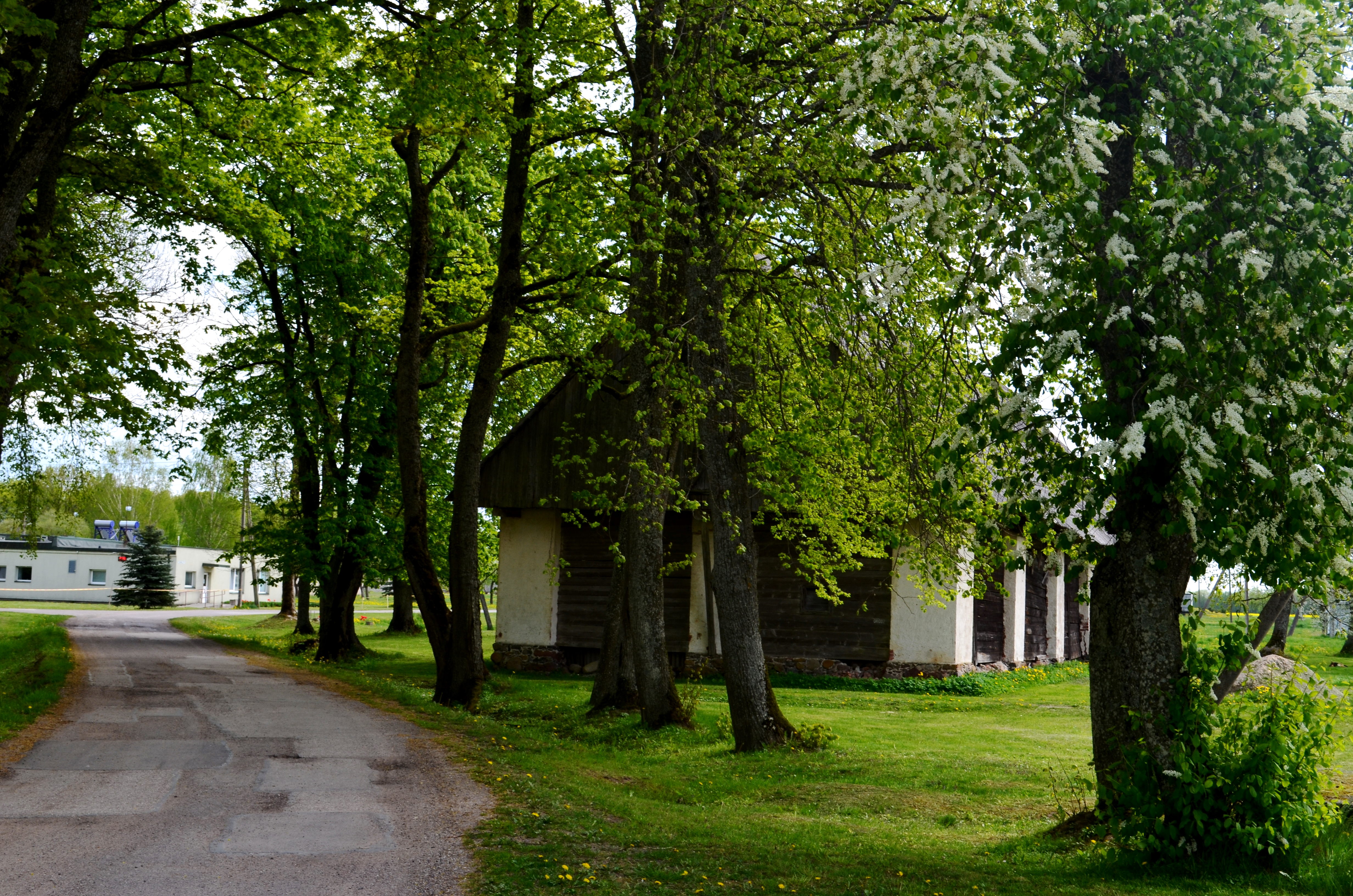 Ilguvos dvaro kluonas, Šakių raj.